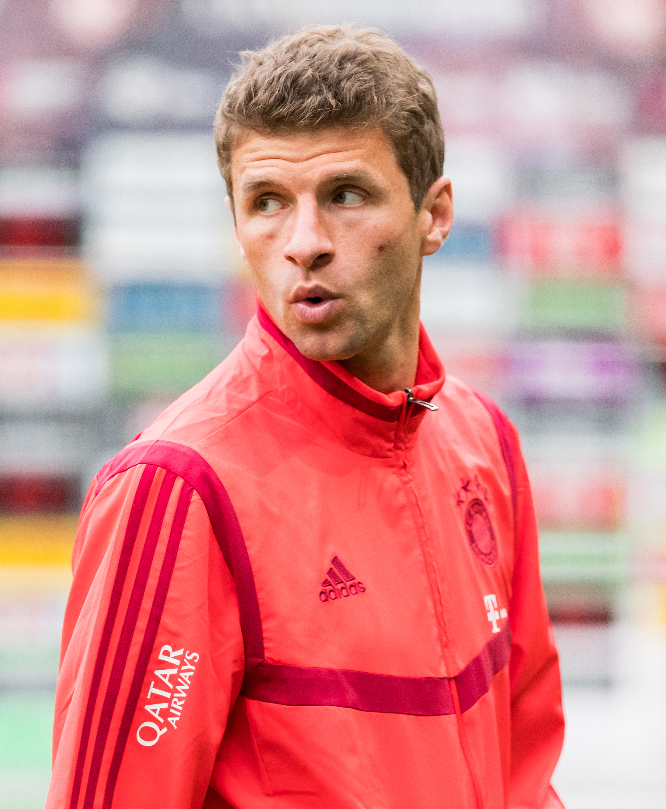 during 1.FC Kaiserslautern vs FC Bayern München at Fritz-Walter-Stadion, Kaiserslautern, Rheinland-Pfalz, Germany on 2019-05-27, Photo: Sven Mandel